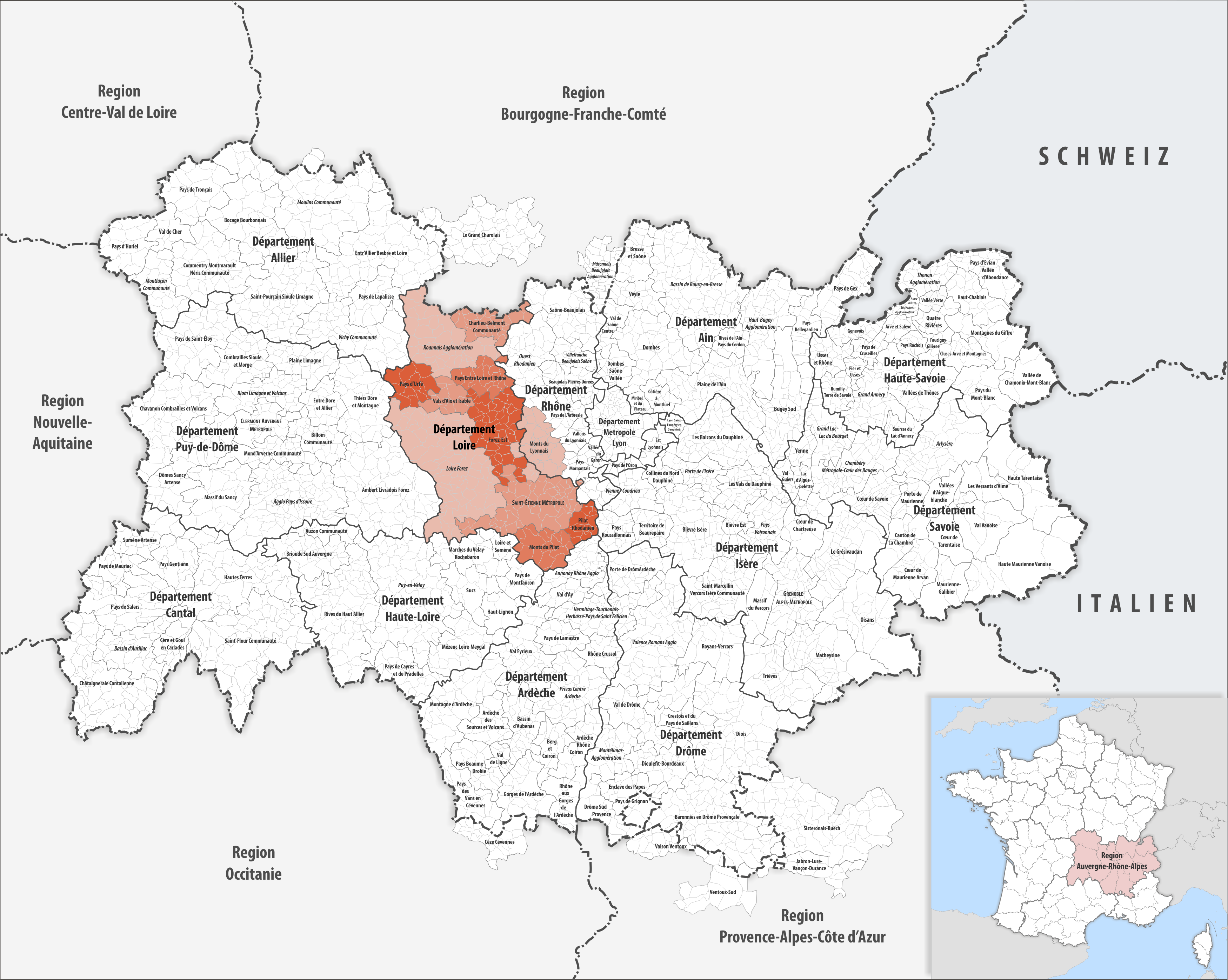 Gemeindeverbände im Département Loire